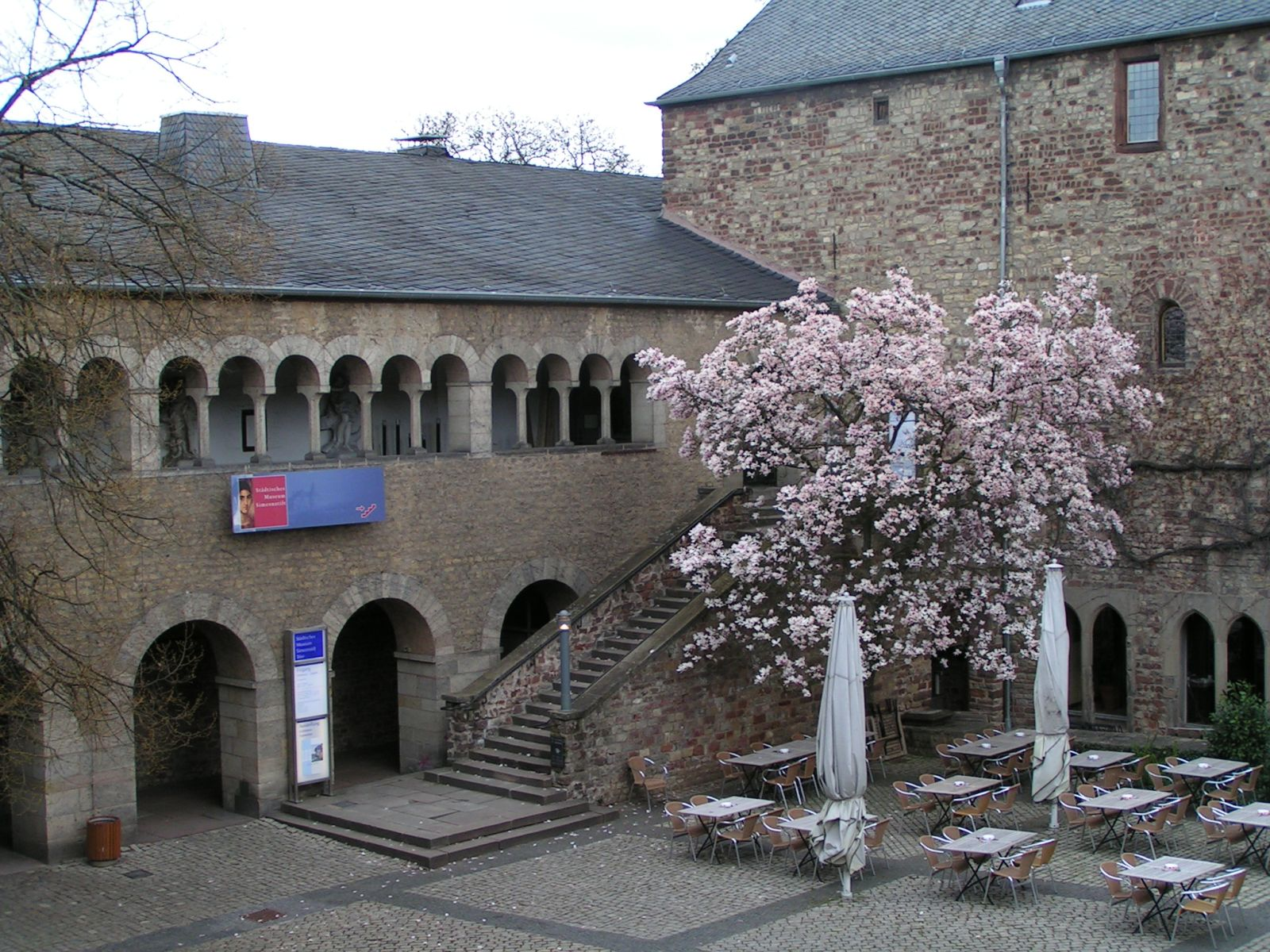 Trier Museum Simeonstift